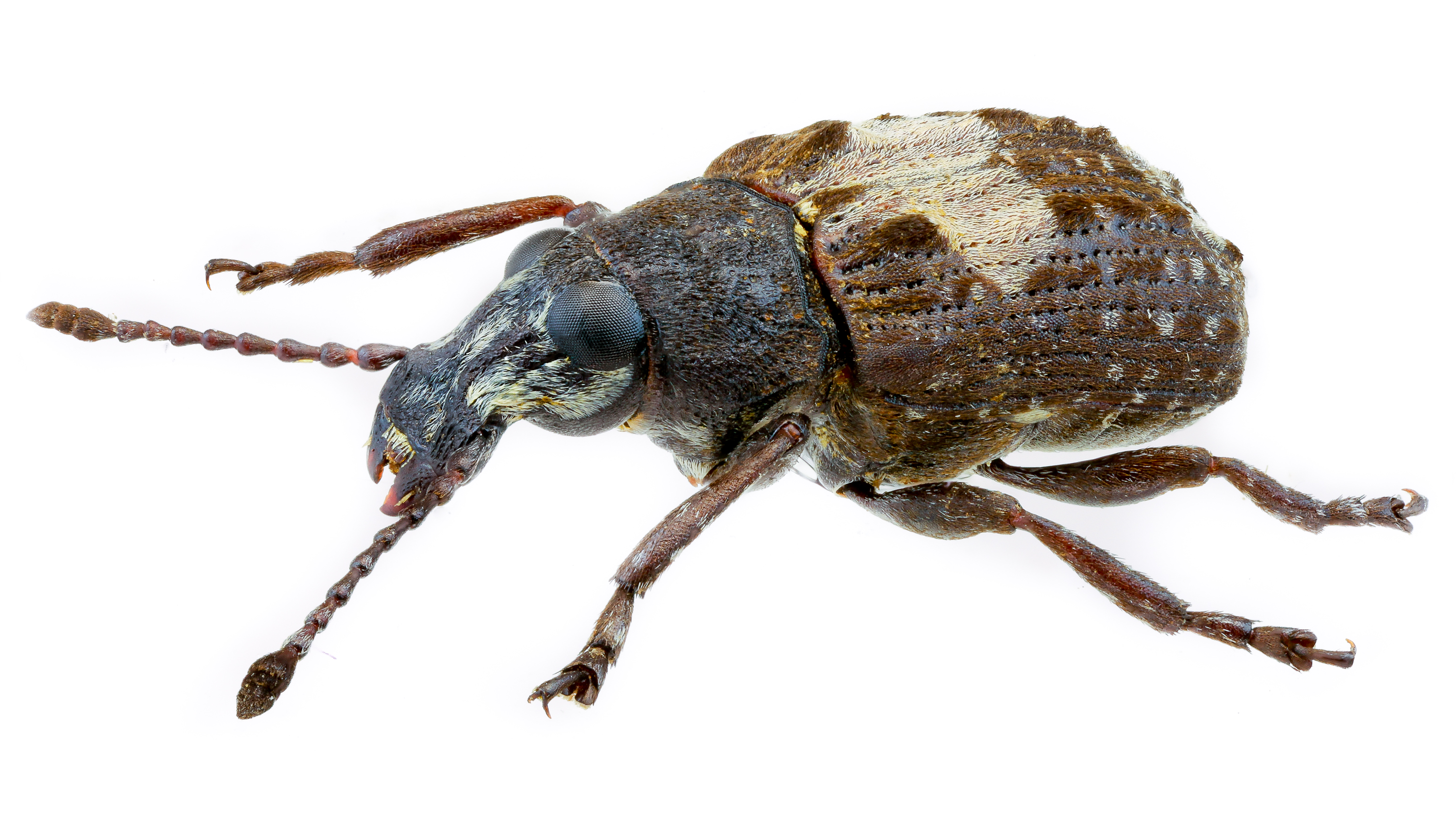 Gonotropis dorsalis